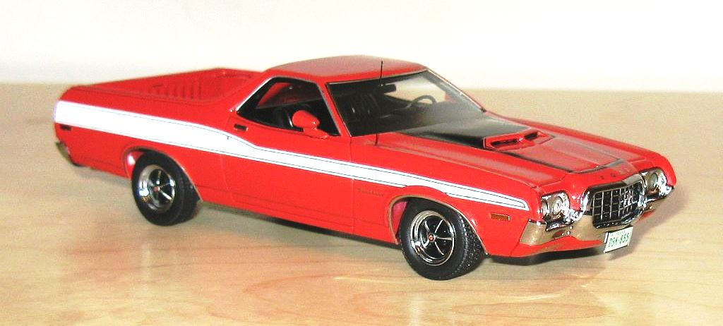 Ford Ranchero by NEO Scale Models, модель представляет Ford Ranchero 1972 года